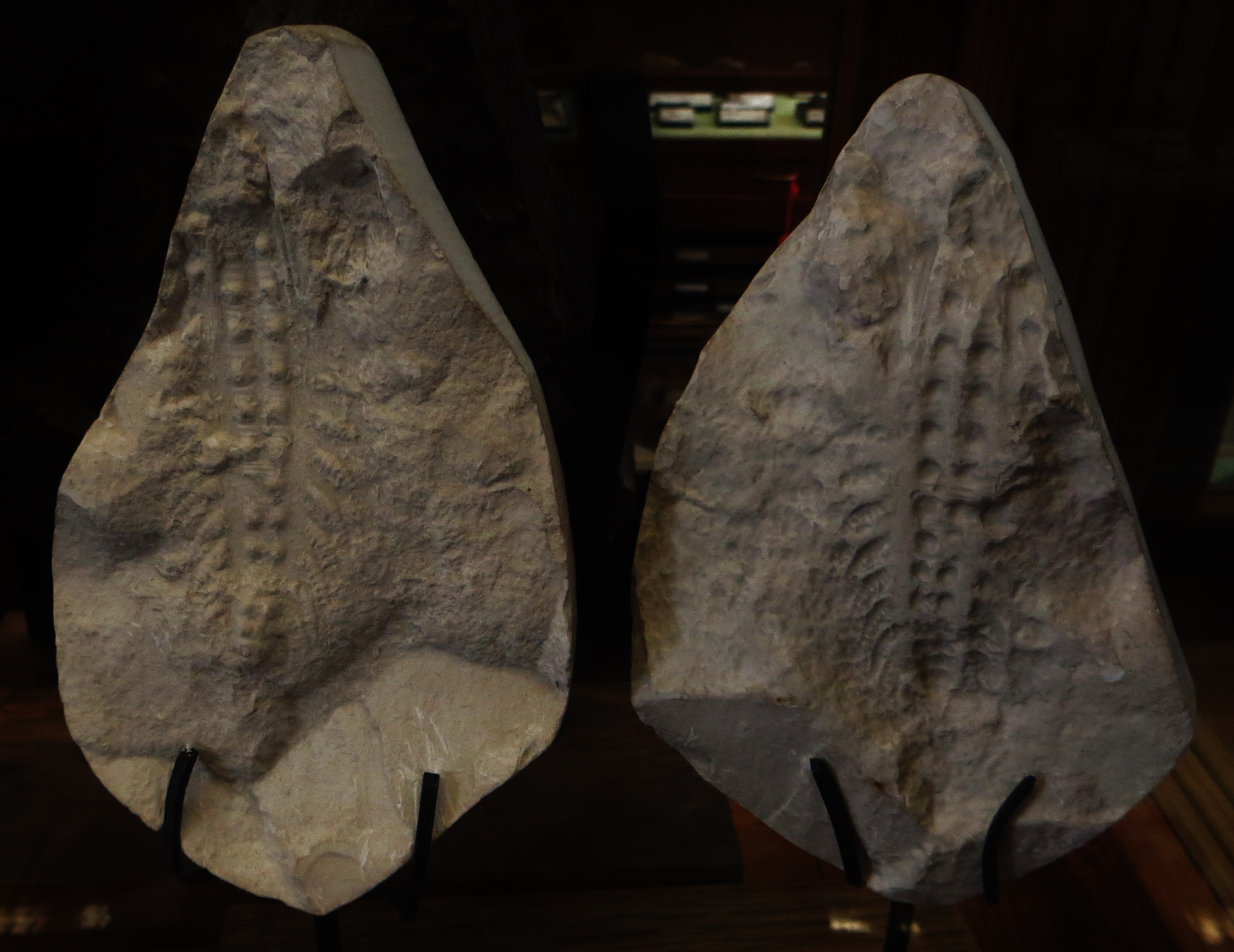 Fossil of Xenusion - Took the picture at Natural History Museum, Bonn University